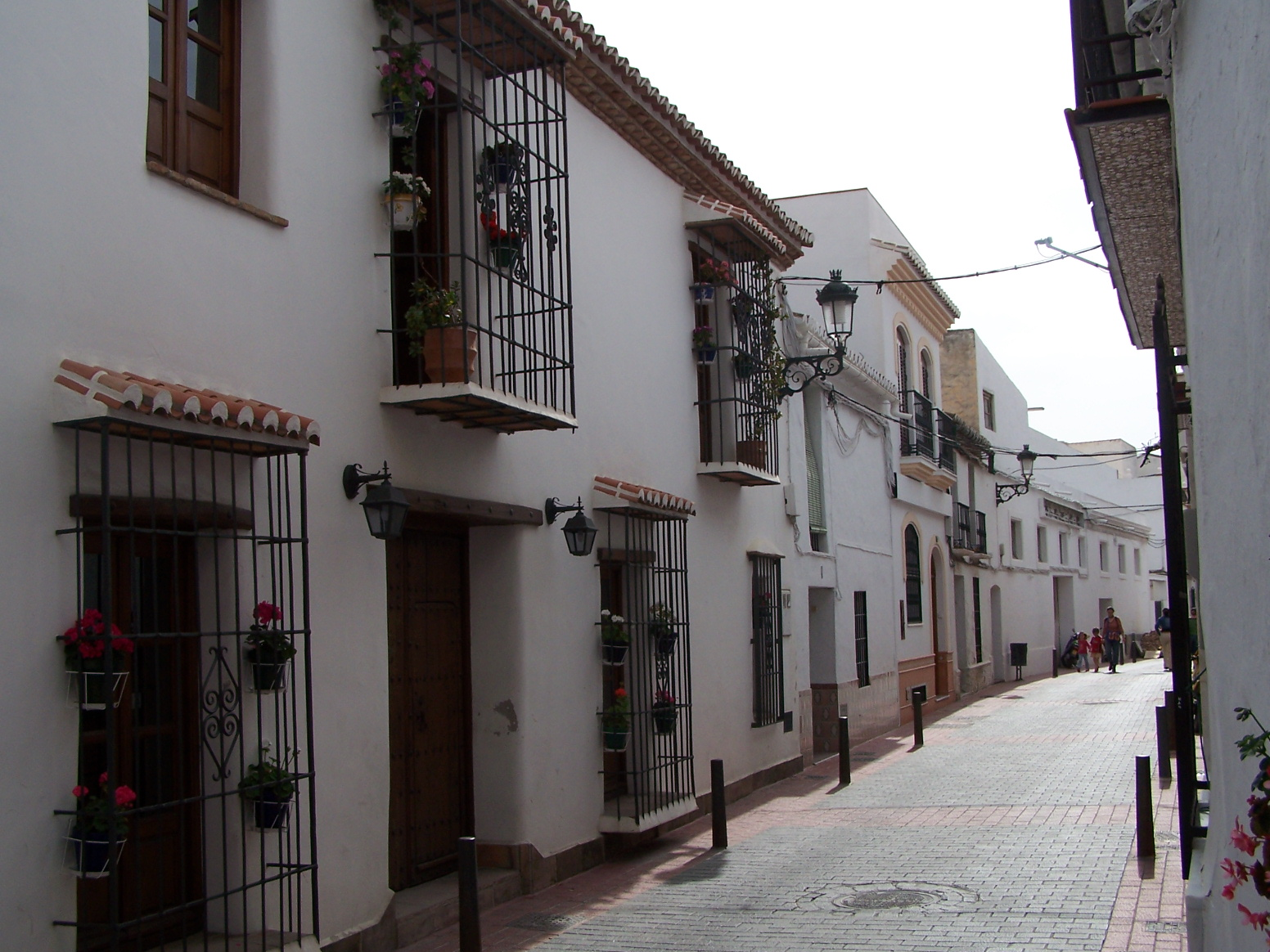 Ruelles de Nerja